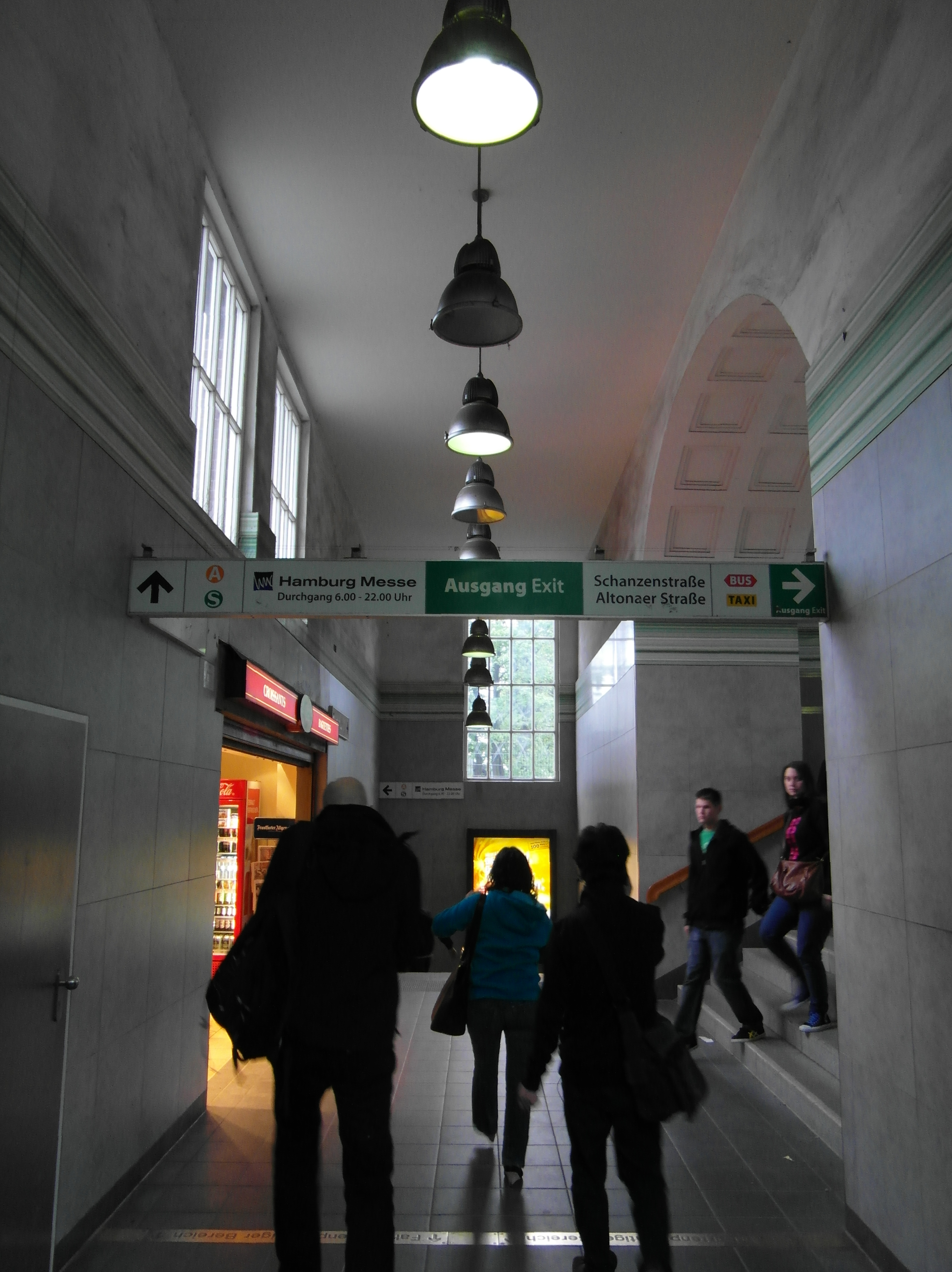 U-Bahnhof Sternschanze in Hamburg - Linie U3